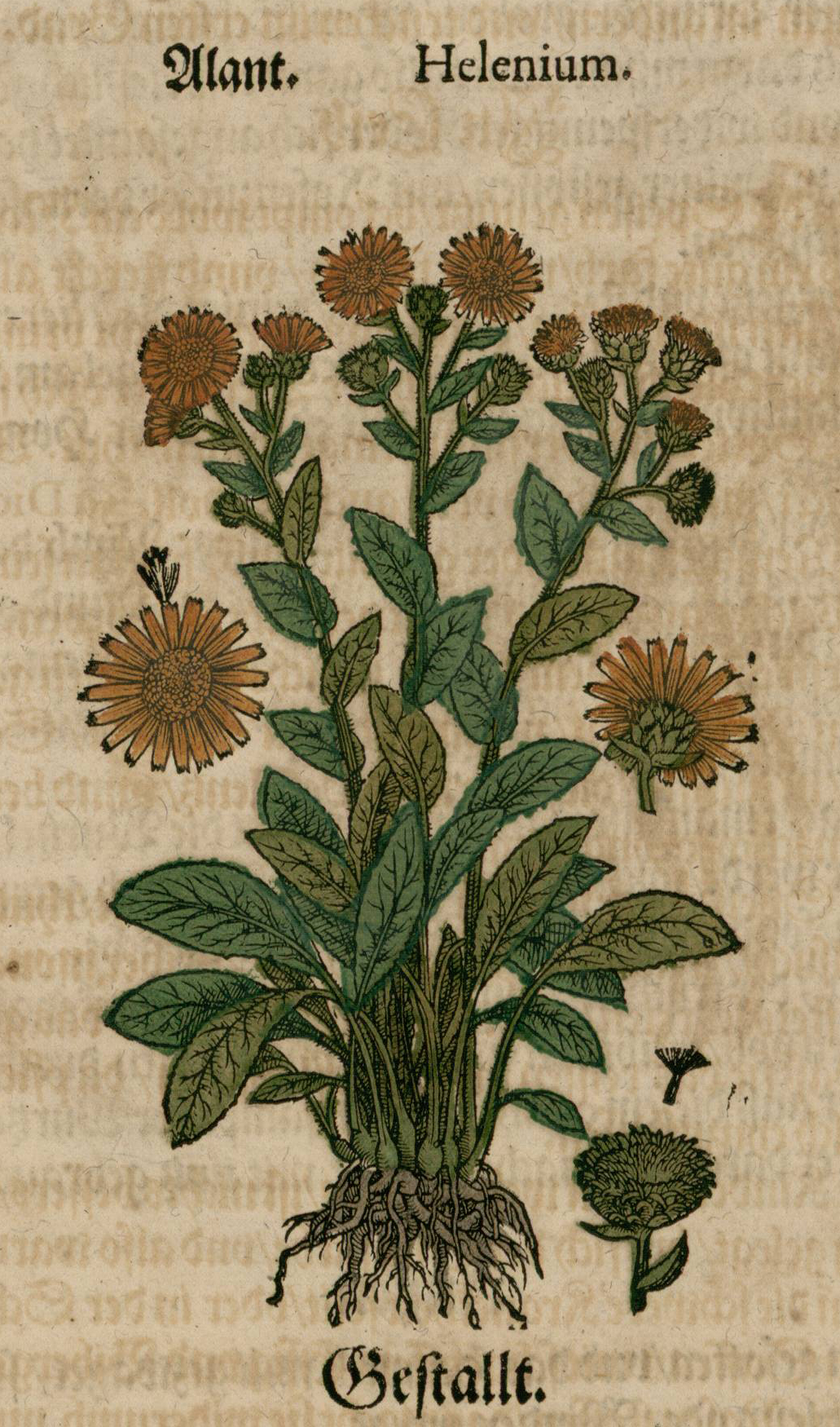 Représentation de la Grande Aunée (Inula helenium).